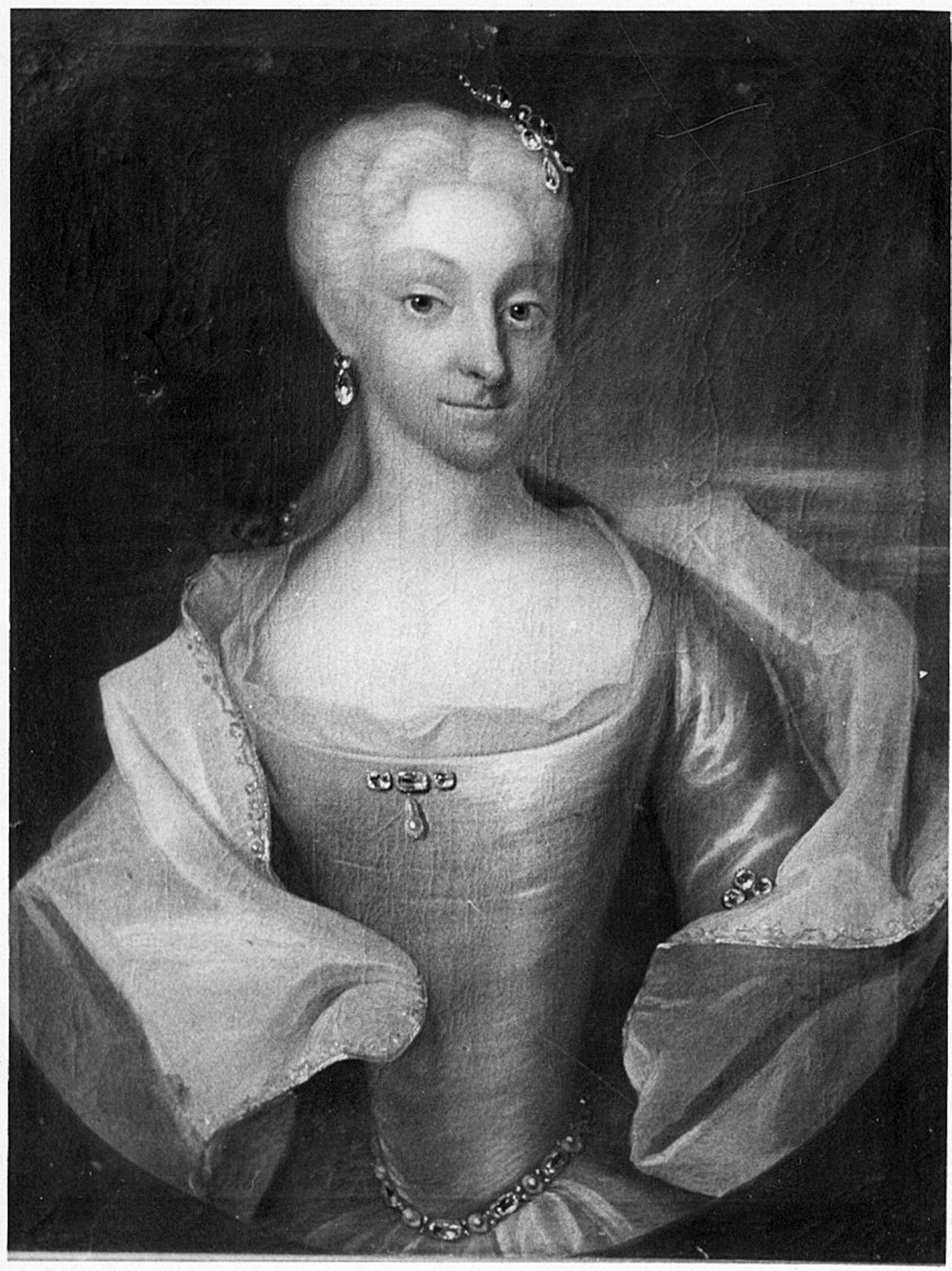 Oljemaleri av Eleonore Hedevig von Plessen, gift Rantzau